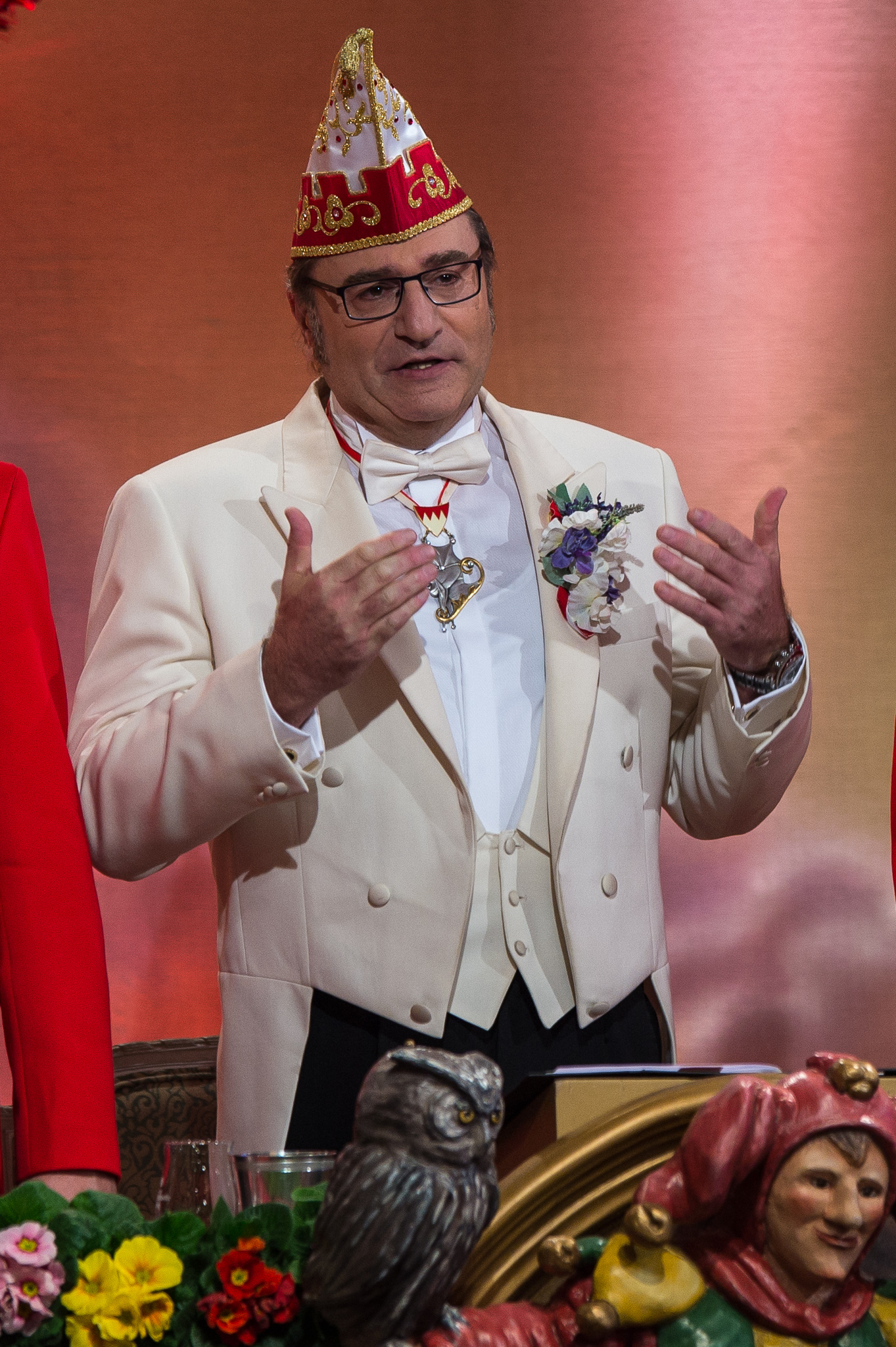 BR,Bayerisches Fernsehen,Bernd Händel,Bernhard John Händel,Fastnacht in Franken,Fastnachts-Verband Franken,Karneval,Live-Sendung,Mainfrankensäle